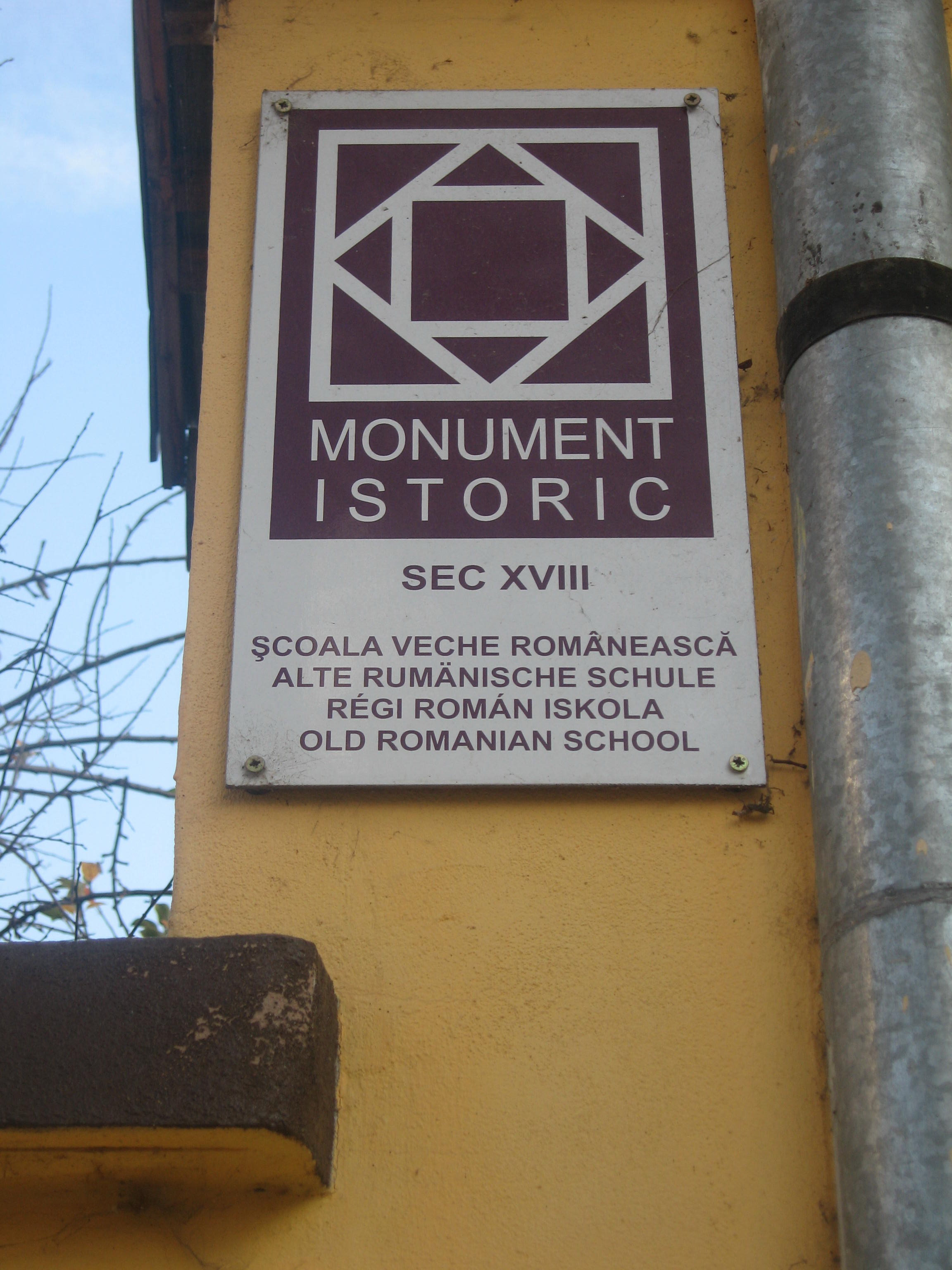 Şcoala veche românească din Sibiu